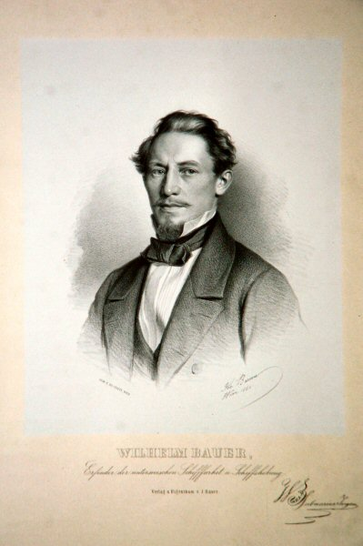 Wilhelm Bauer, Lithographie von Josef Anton Bauer, 1860